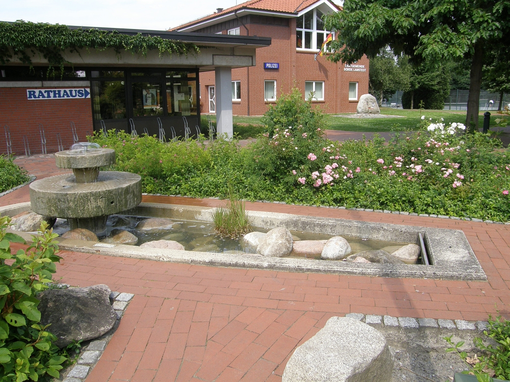 Der Brunnen vor dem Rathaus